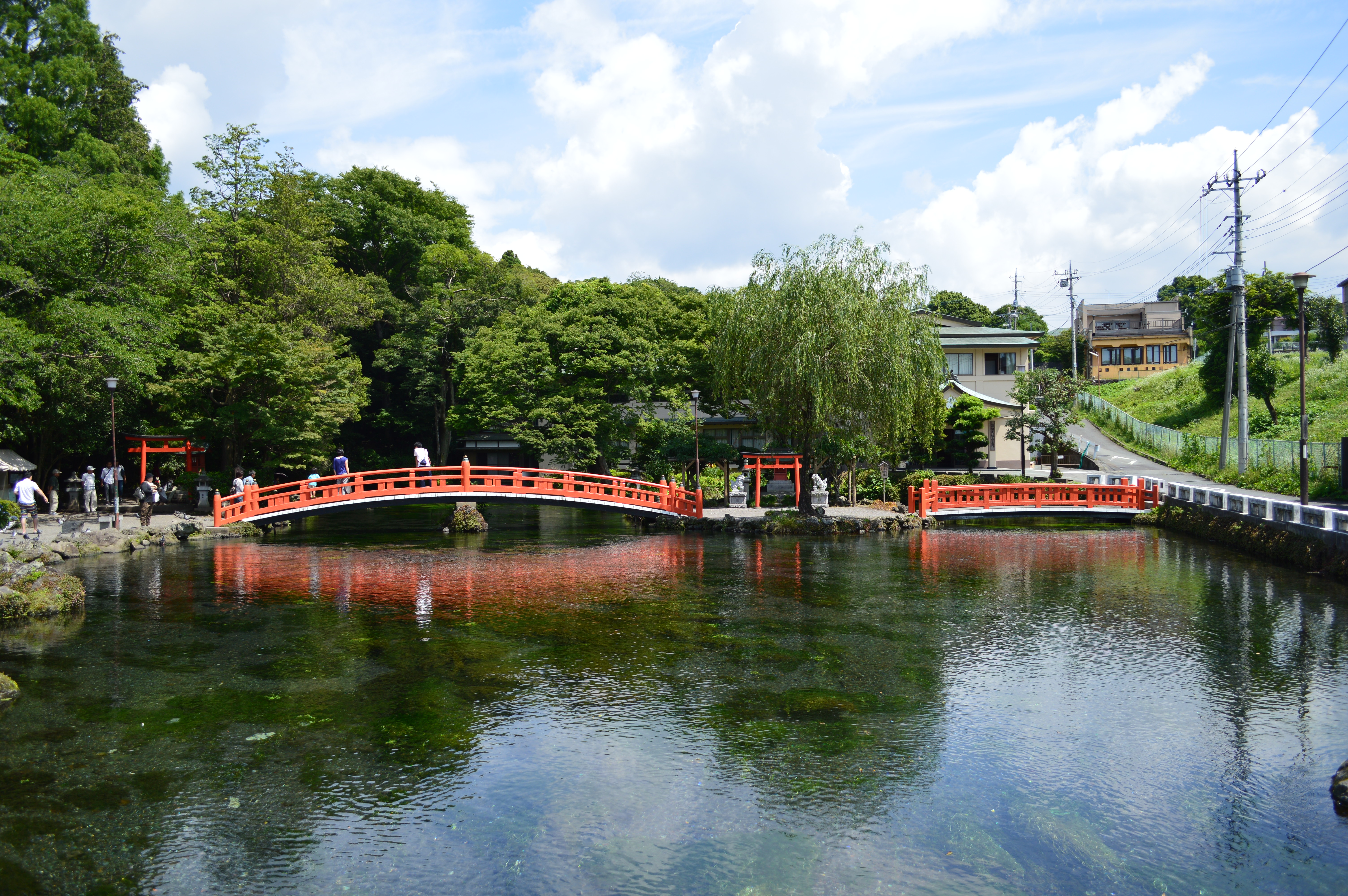 湧玉池 遠景 (神幸橋より)